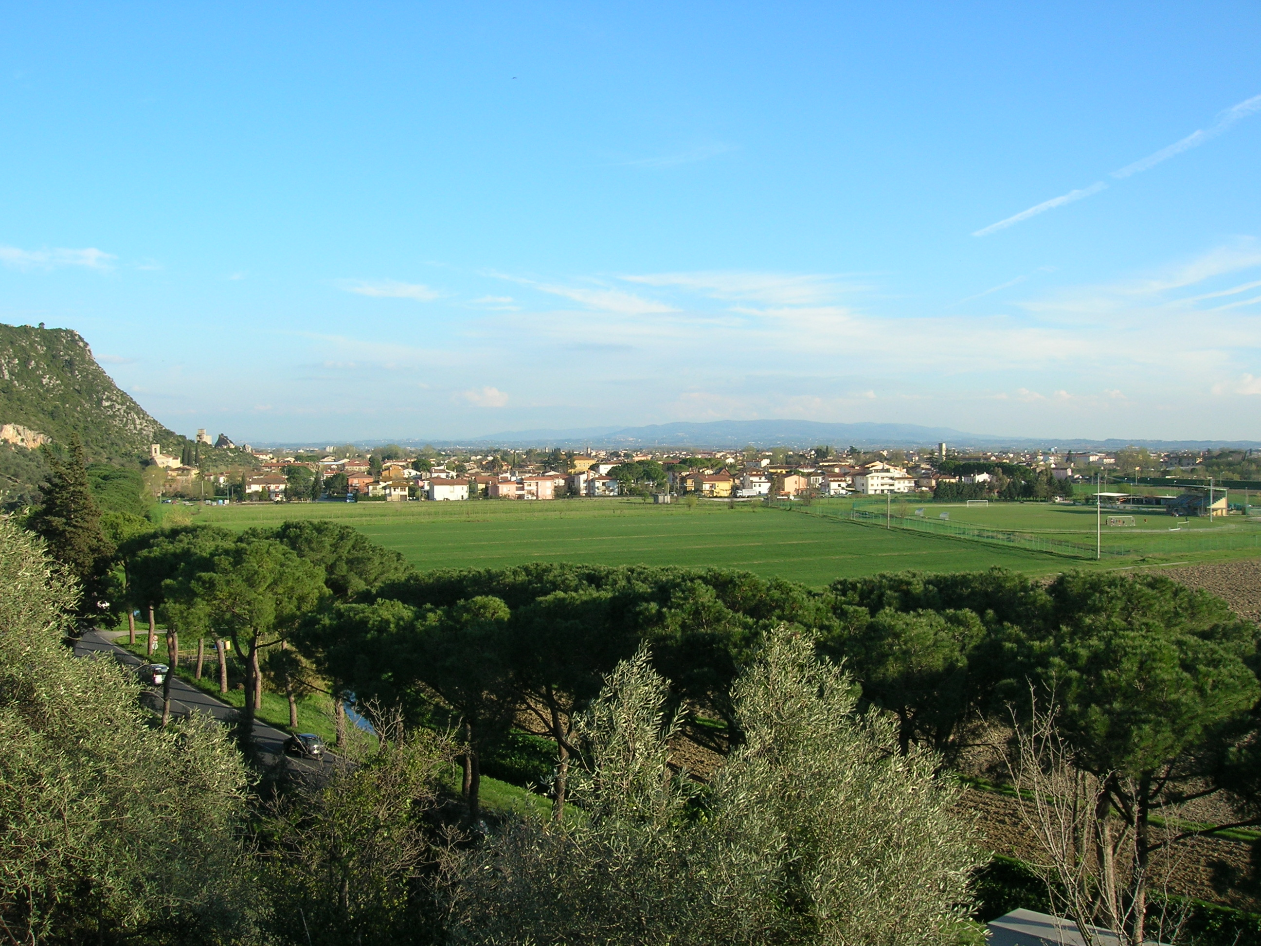 Uliveto Terme visto dai Grugoli